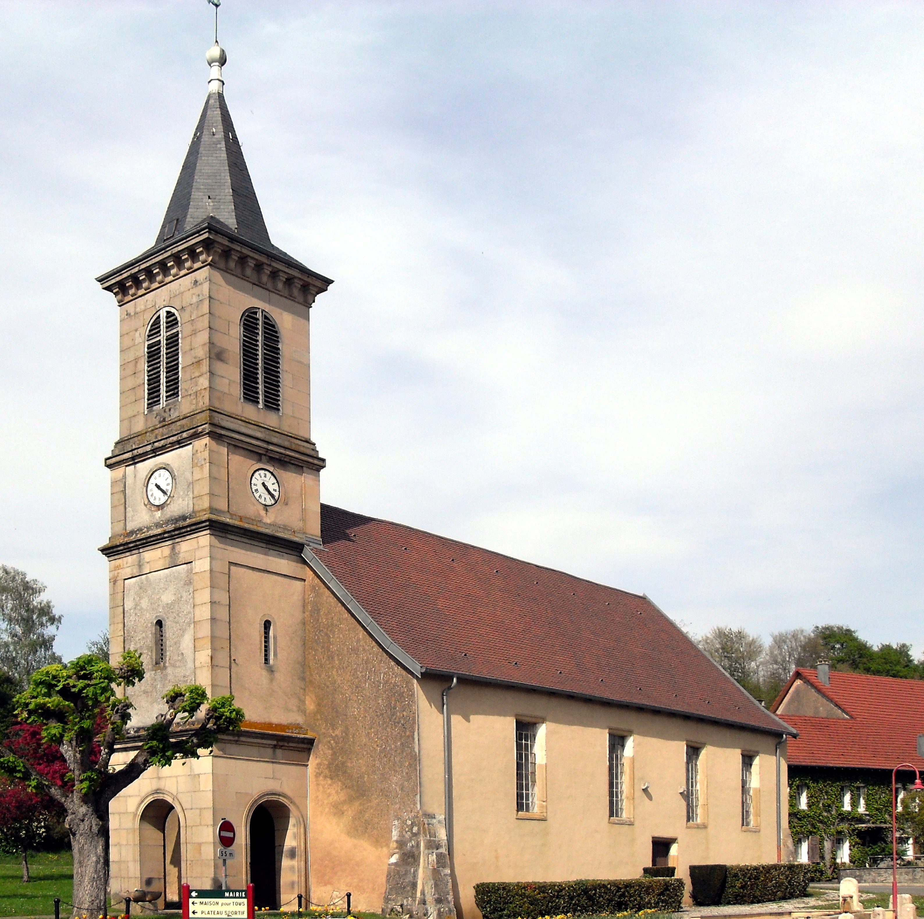 Le temple protestant à Dambenois